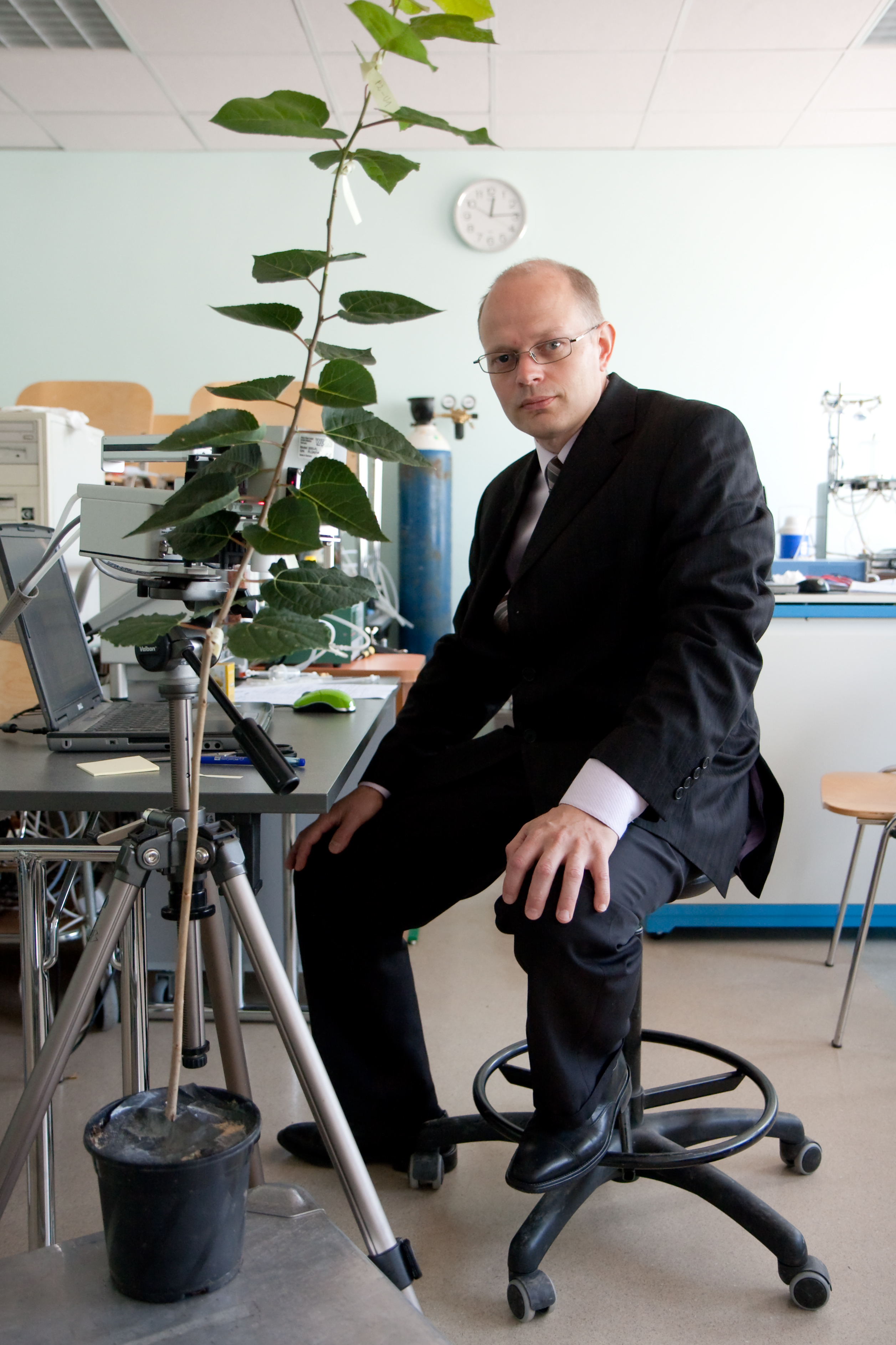 Taimefüsioloogia professor Ülo Niinemets 2012. aastal Tartus, Maaülikooli metsamajas.